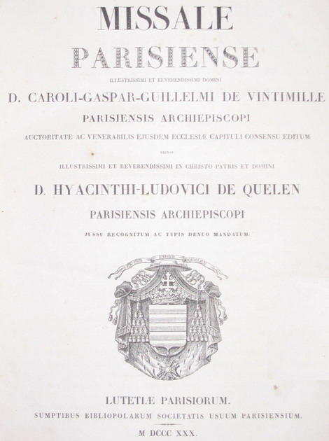 Page de garde du missel de rite parisien, publié par l'archevêque de Paris 1830 photographie personnelle